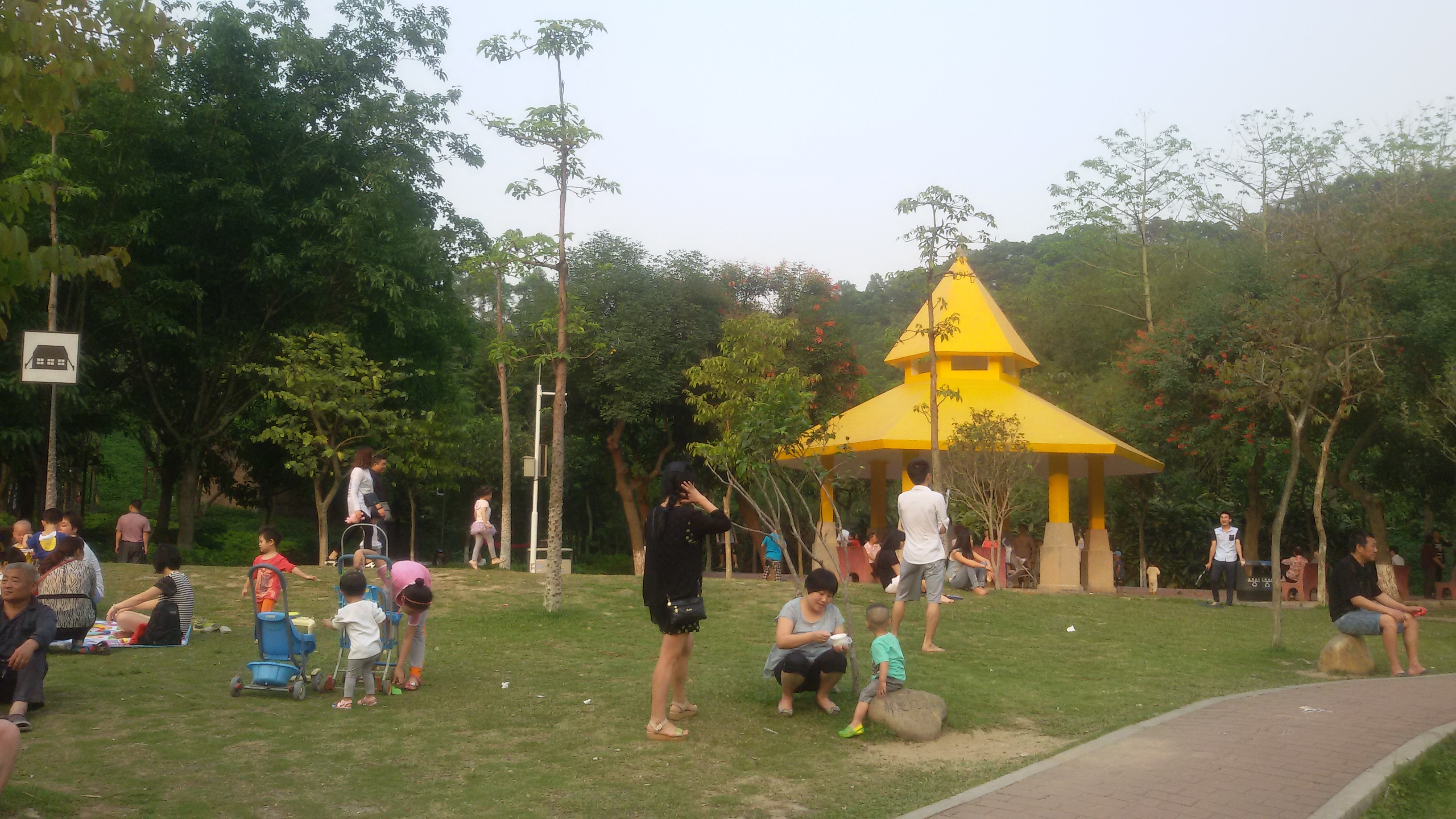 粵語: 白雲永泰乒乓體育公園嘅中心園區